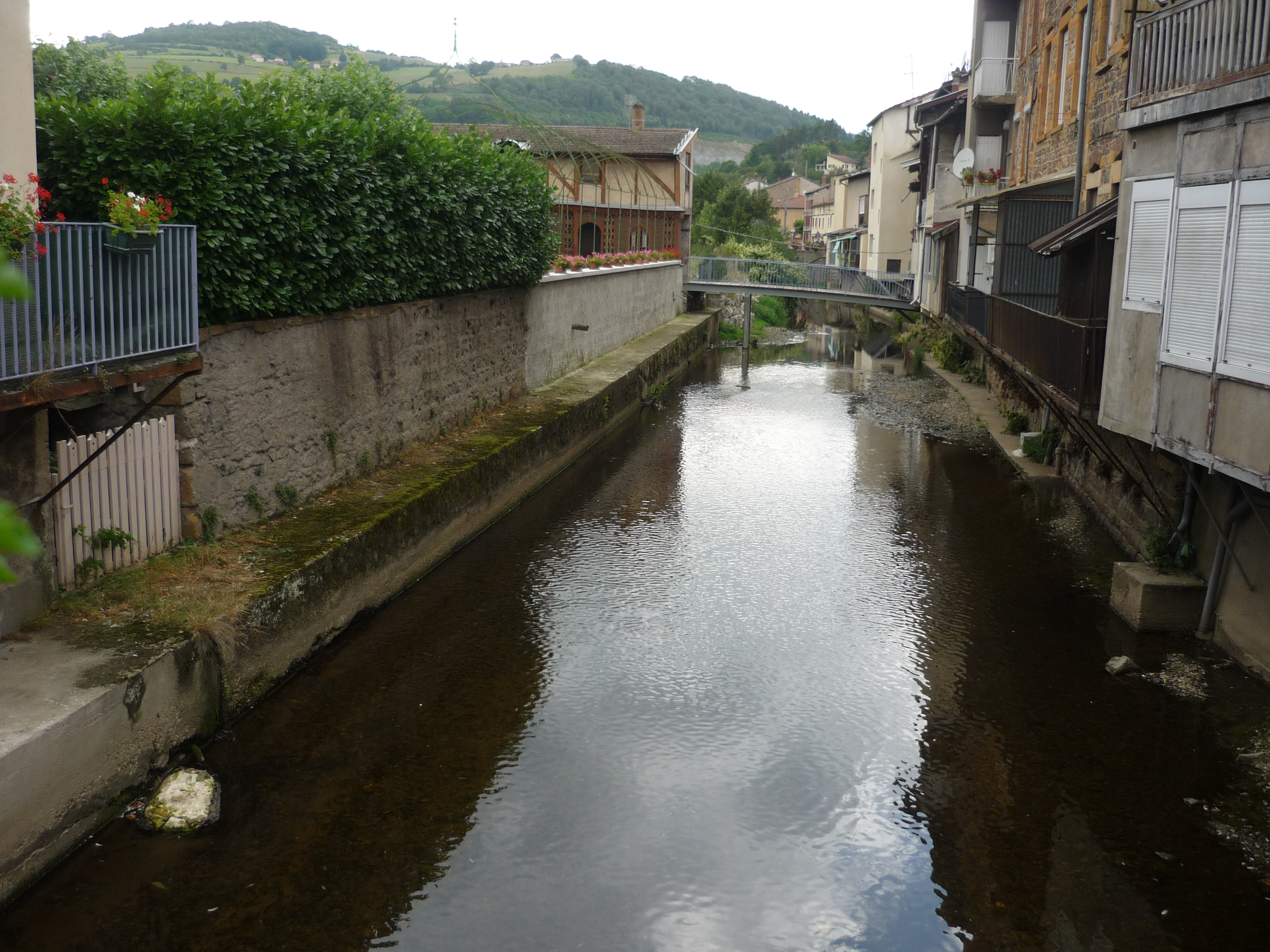 Rivière de la Turdine à Pontcharra-sur-Turdine dans le département du Rhône.